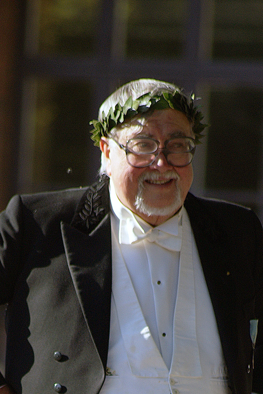 Jan-Öjvind Swahn vid doktorspromovering 2006-06-02